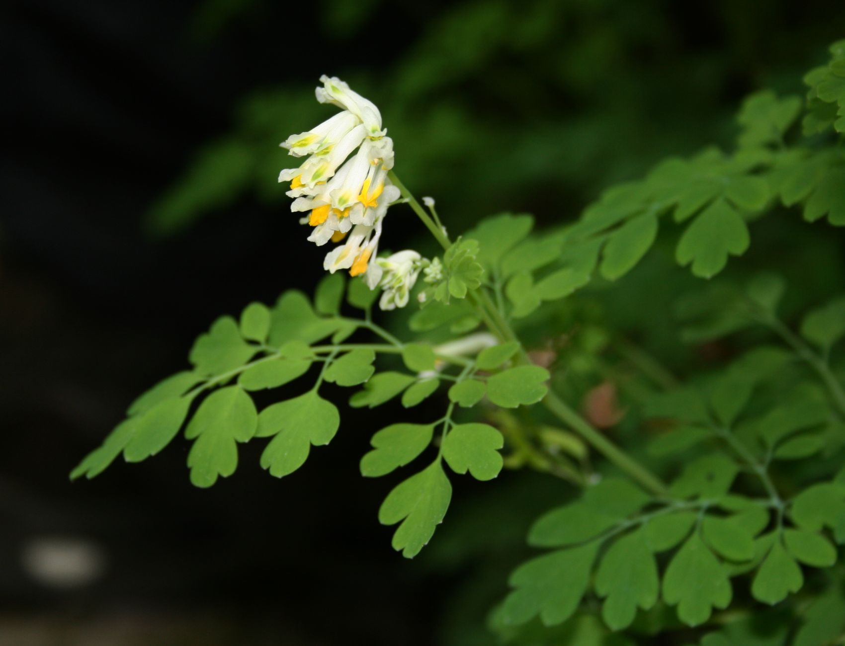 Pseudofumaria alba subsp. alba, Mohngewächse (Papaveraceae), Erdrauchgewächse (Fumarioideae) - Italien/Italia/Italy: Friuli-Venezia Giulia, Prov. Trieste, Grotta di Trebiciano